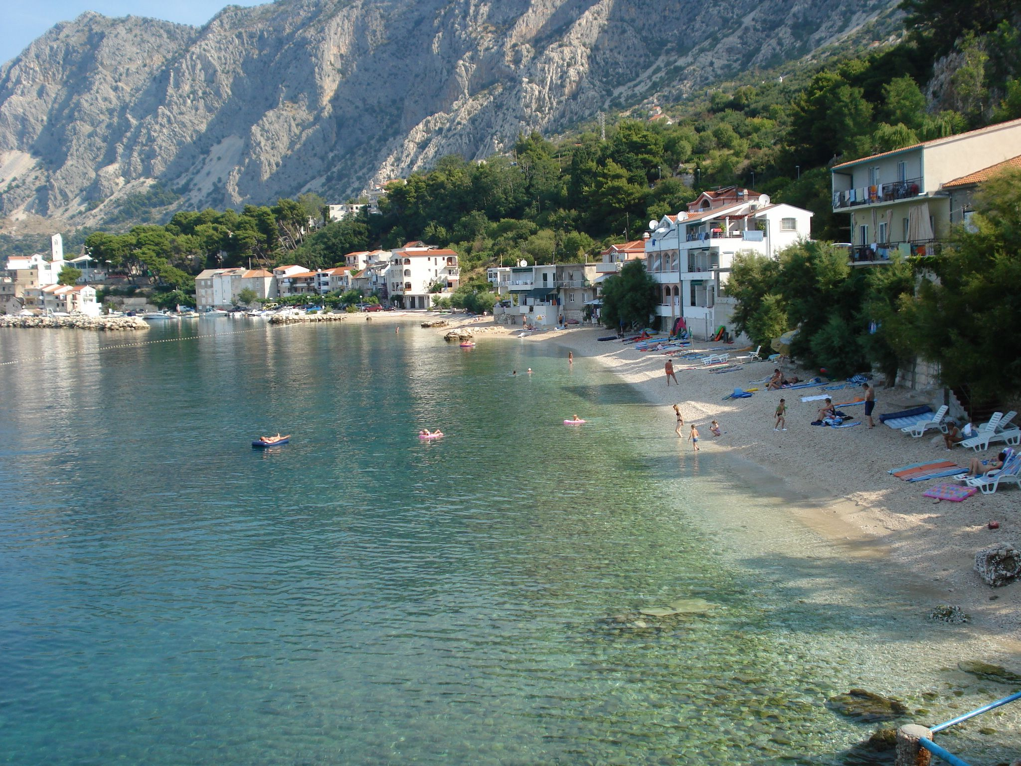 Drasnice